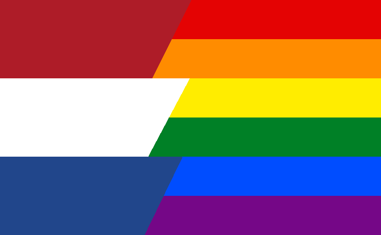 Bandera gay Países Bajos.